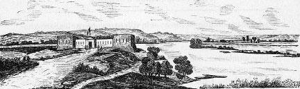 Fort de Lampsar sur le marigot de Khassak (Sénégal) [illustration de Côte occidentale d'Afrique du Colonel Frey, Bandeau en tête du chap.VI p.165 :] Fig.102. [Cote : Réserve A 200 386]